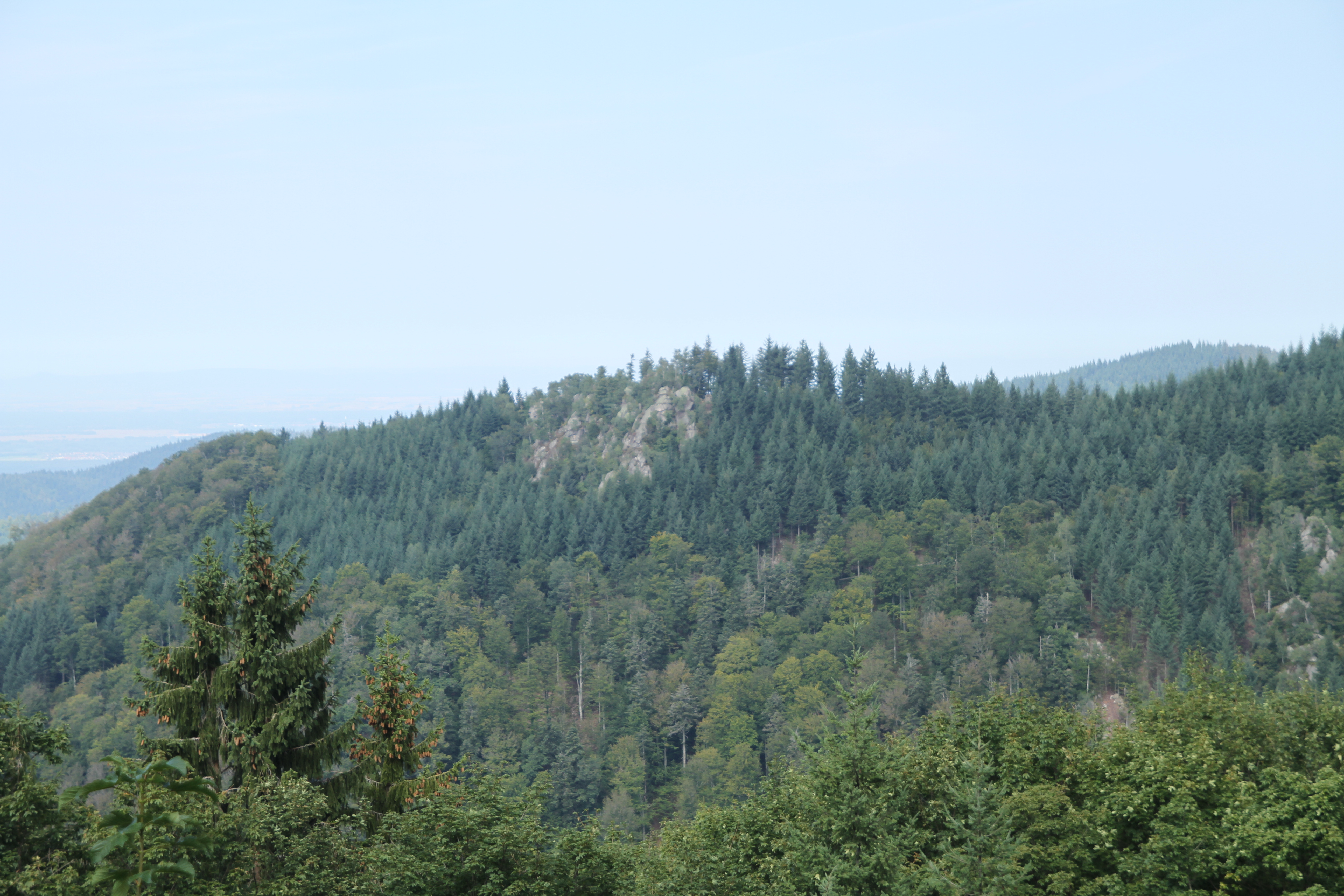 Der Brockenfelsen aus Sicht der Wiedenfelsen im Schwarzwald.